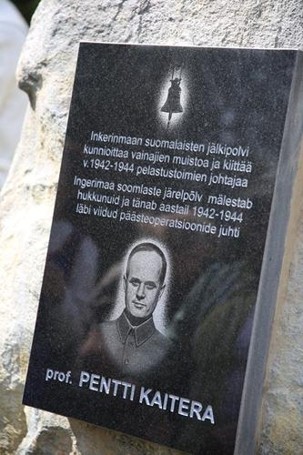 Pentti Kaiteralle tehty muistotaulu Inkeriläisten auttamisesta.